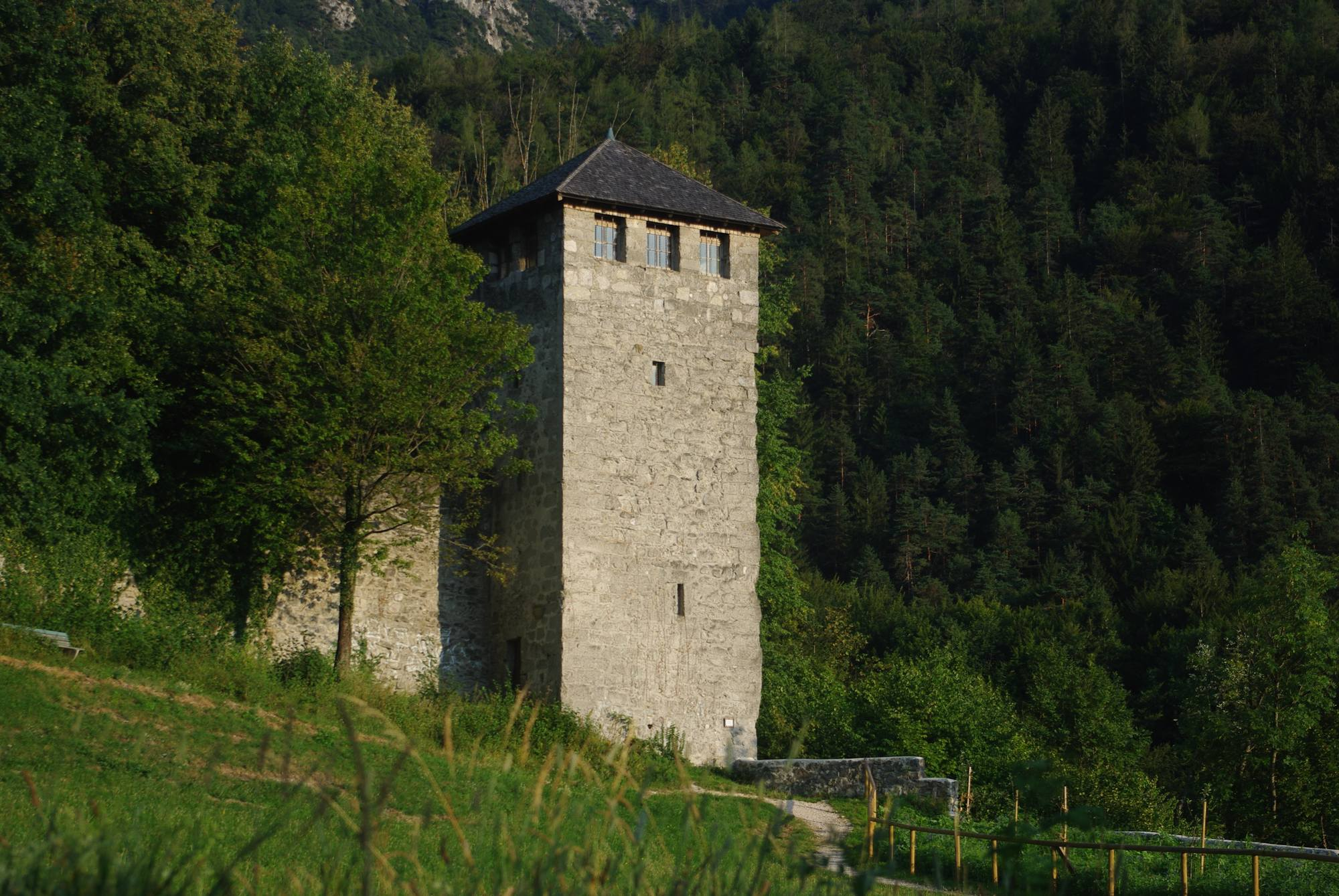 Pulverturm, Teil der ehemaligen Stadtbefestigung von Bad ReichenhallThis is a photograph of an architectural monument.